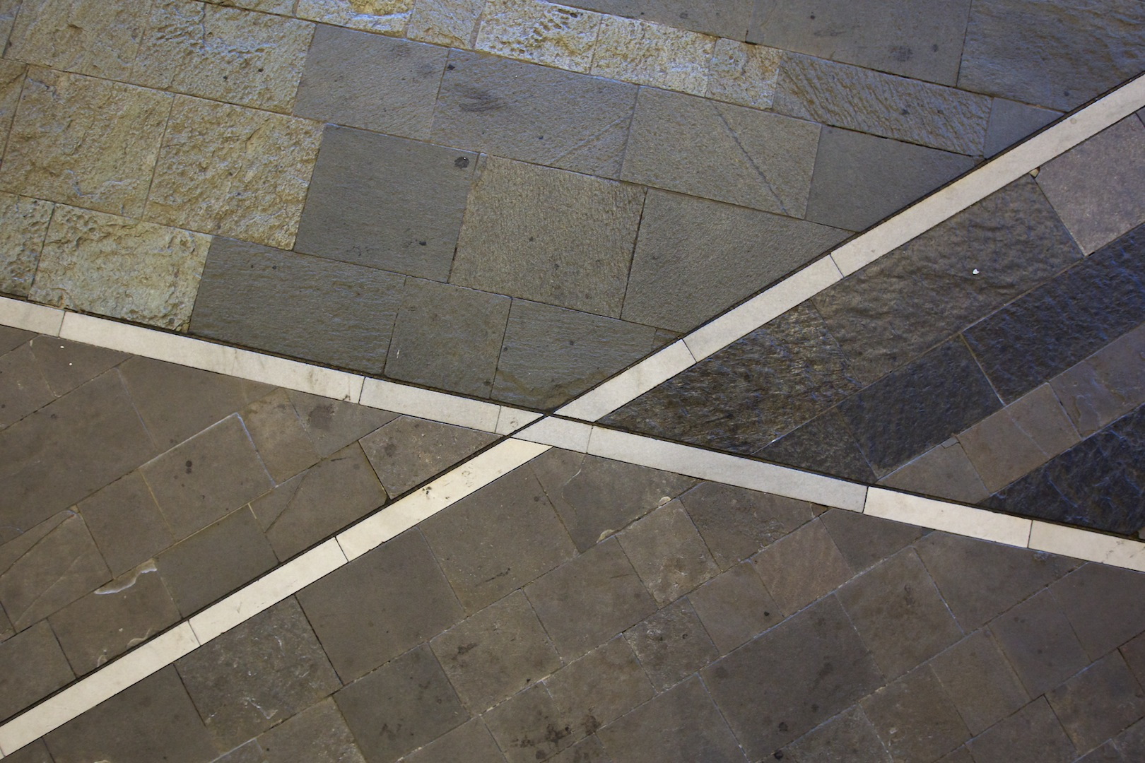 Der von Erich Fritz Reuter gestaltete Fußboden im Foyer der Staatsbibliothek zu Berlin (Haus Potsdamer Straße)